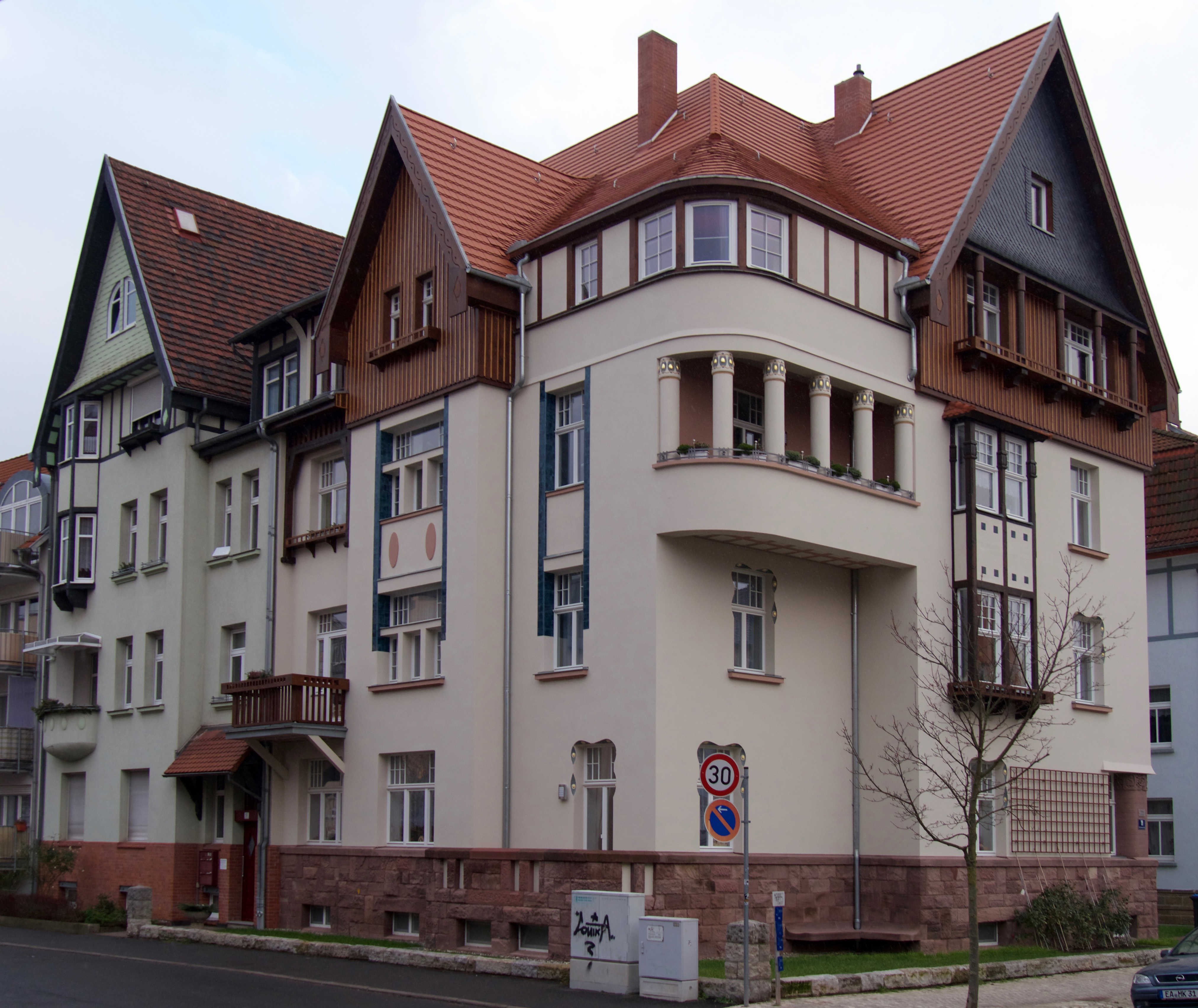 Denkmalgeschütztes Mehrfamilienhaus in der Karolinenstraße 19, von Südosten aus gesehen. This is a photograph of an architectural monument. It is on the list of cultural monuments of Eisenach